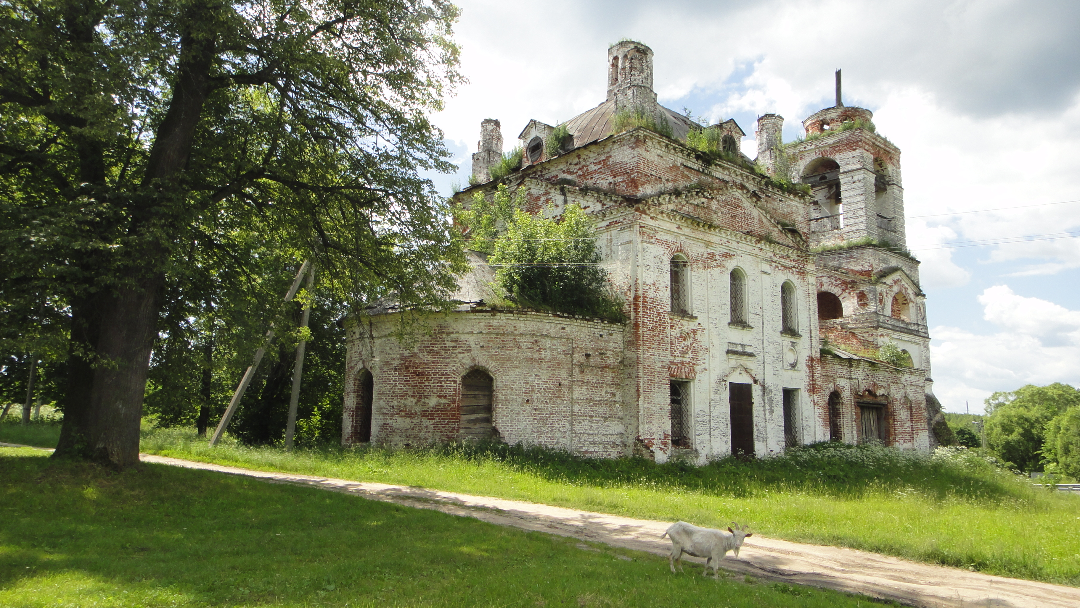 (Владимирская область, Вязники, деревня Станки)